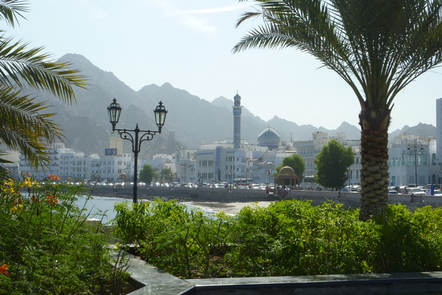 Hafenstadt Matrah